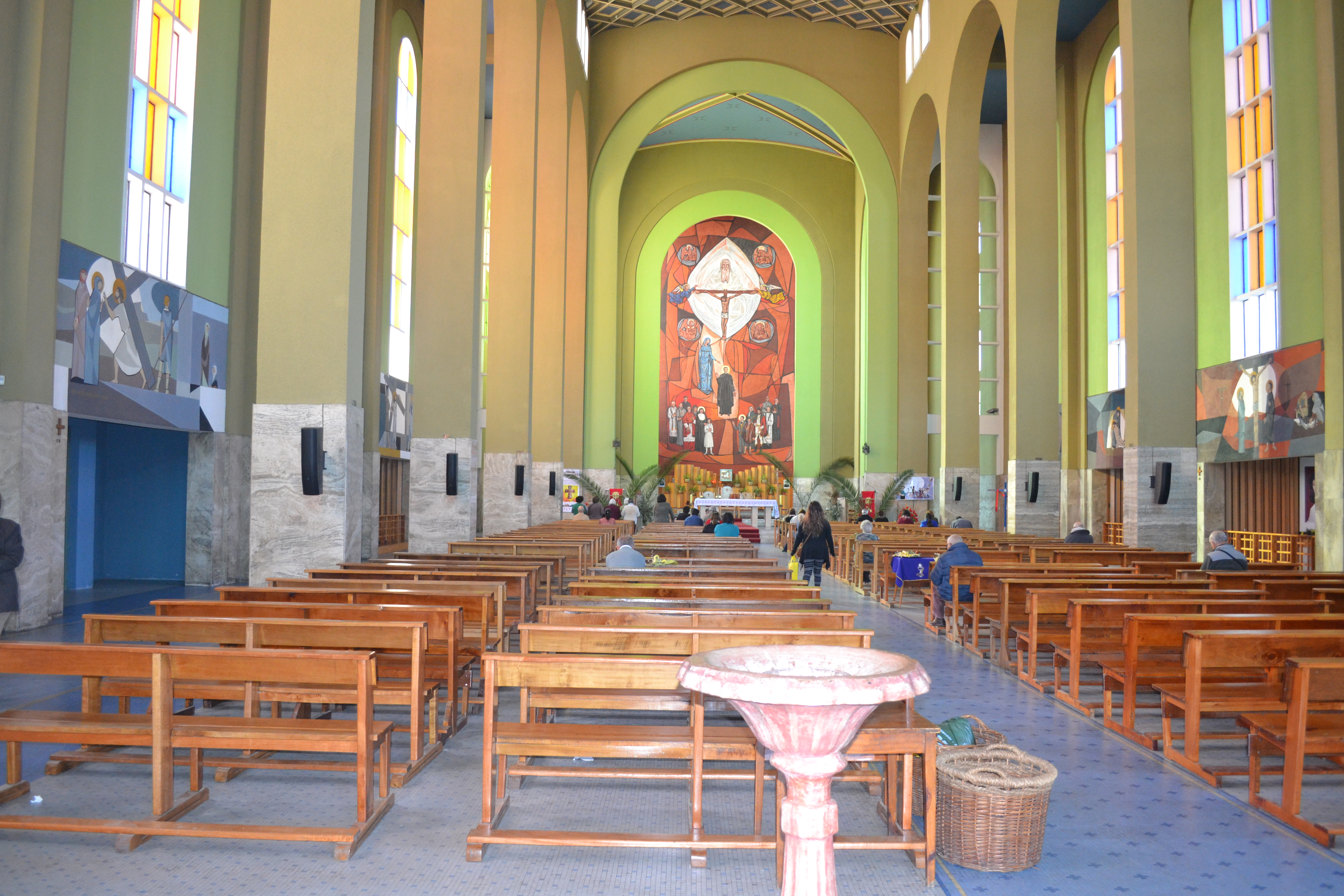 Panorámica del interior del Templo Don Bosco de La Cisterna.